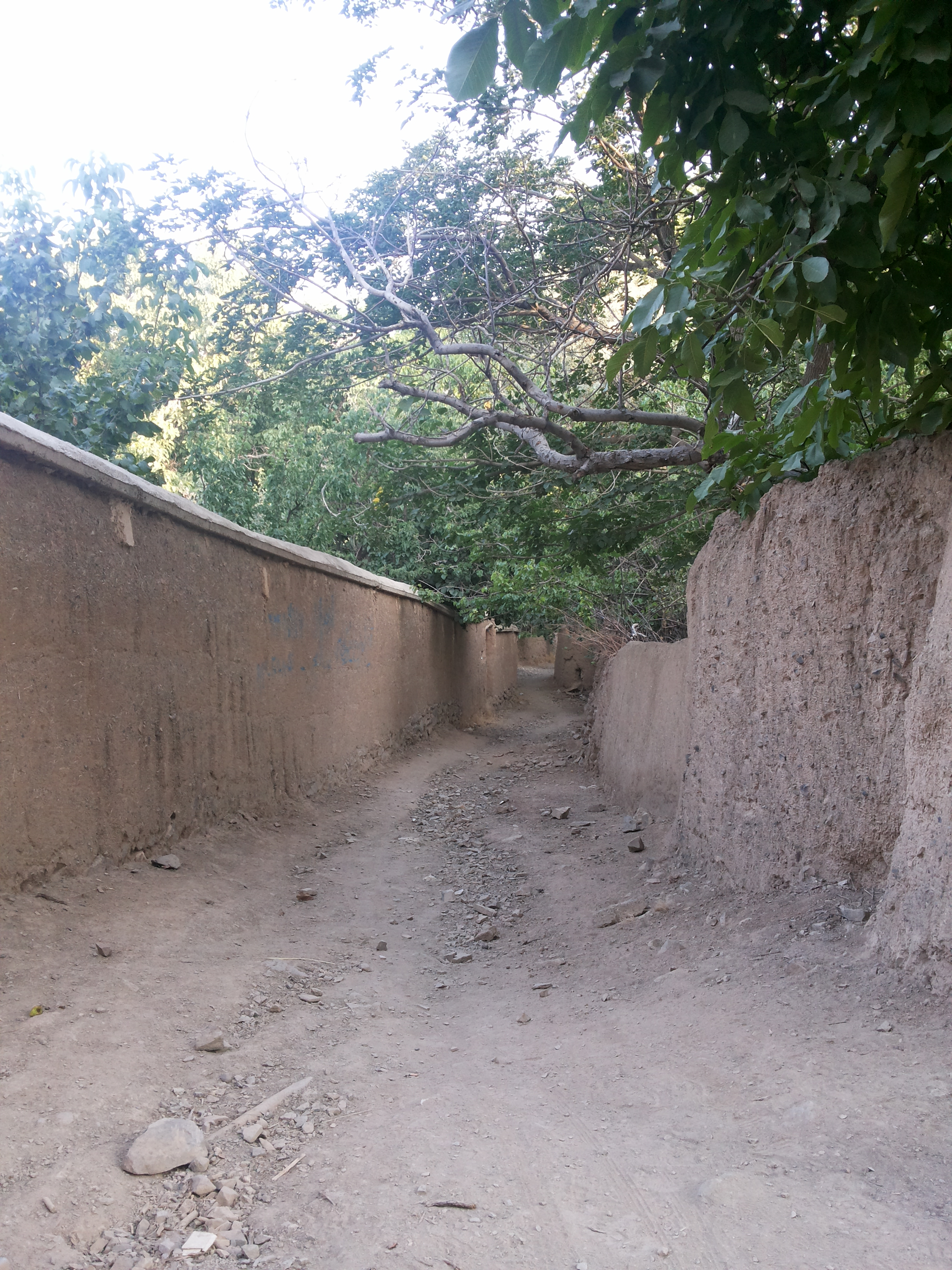 یک کوچه باغ در کلهرود